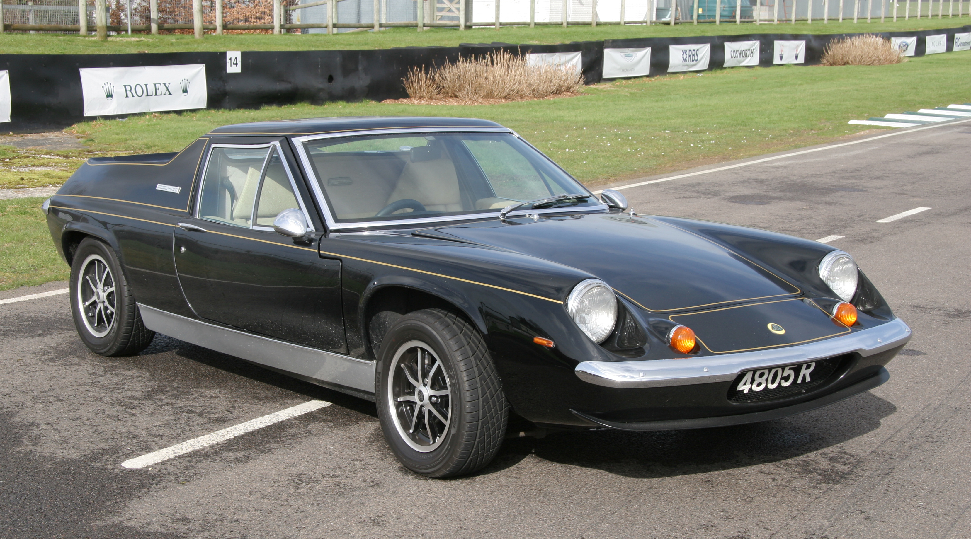 Lotus Europa